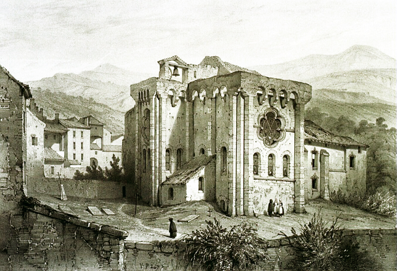 Gravure de l'église de Royat (Fin XIXème siècle)